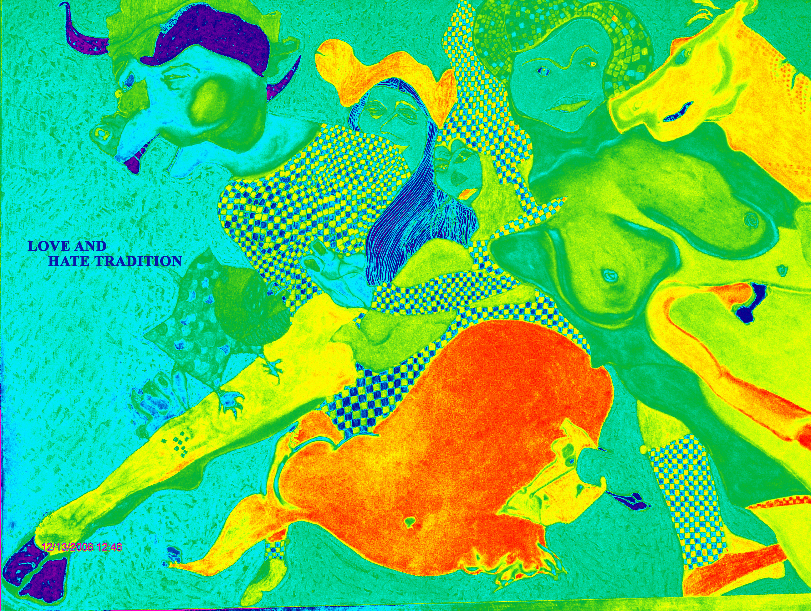 Baseado em «A Pega», de PXECO, Exposição Alcarte, Alcochete, 2006. Lápis e pastel sobre prensado de madeira.